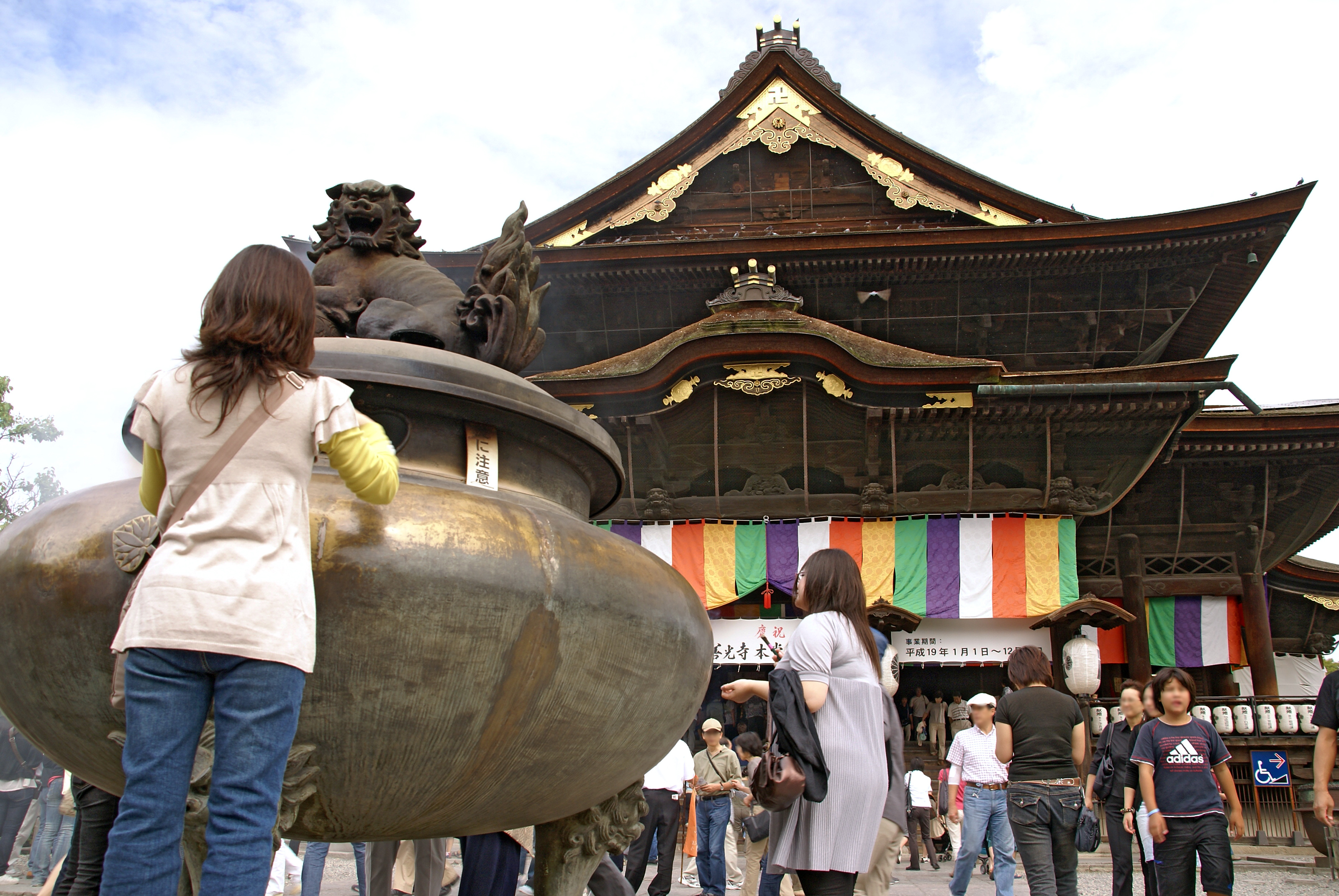 Zenkoji in Nagano, Nagano prefecture, Japan